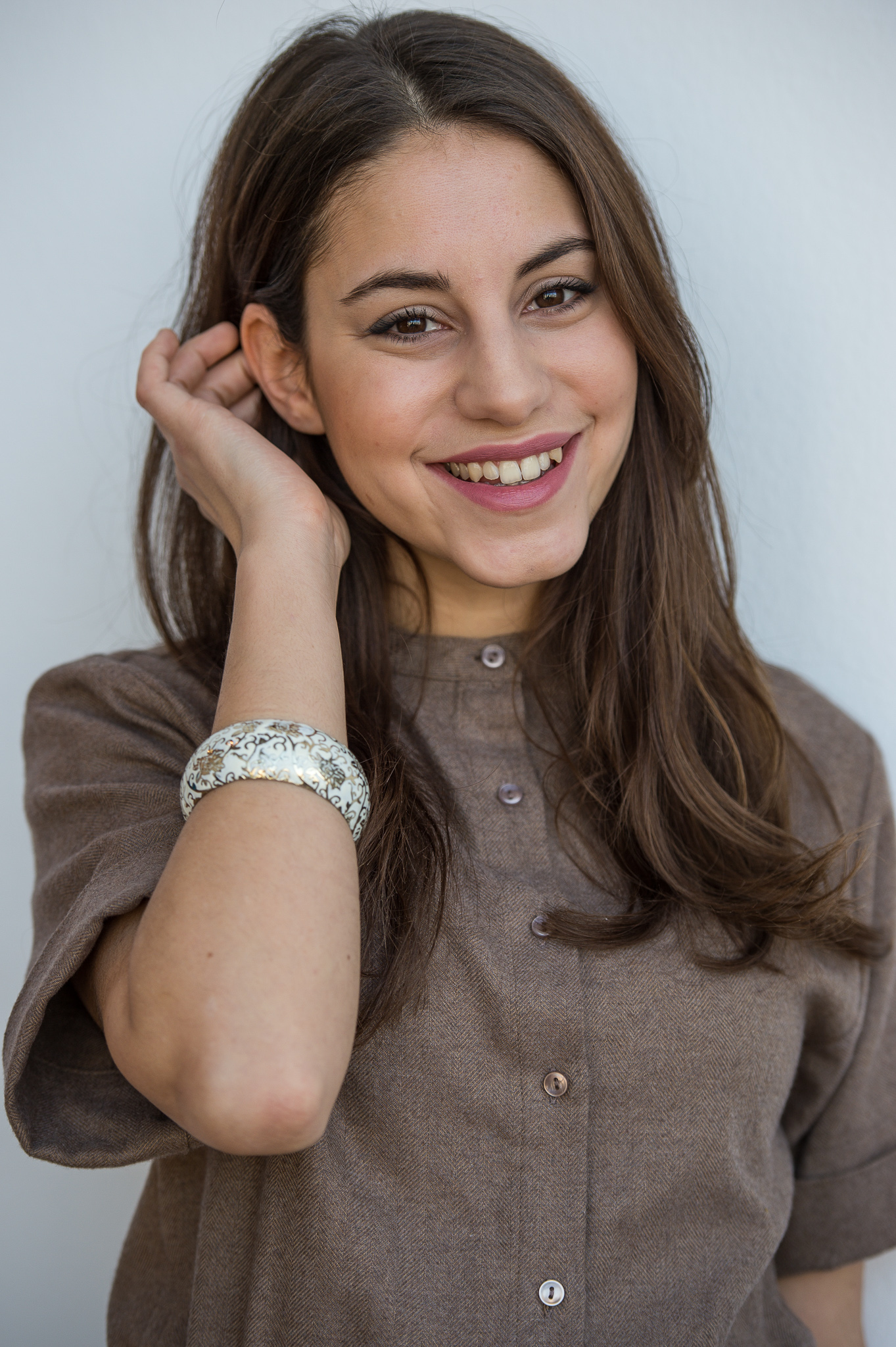 Almila Bagriacik,BR,Bayerischer Rundfunk,Bayerisches Fernsehen,Filmbrunch 2017